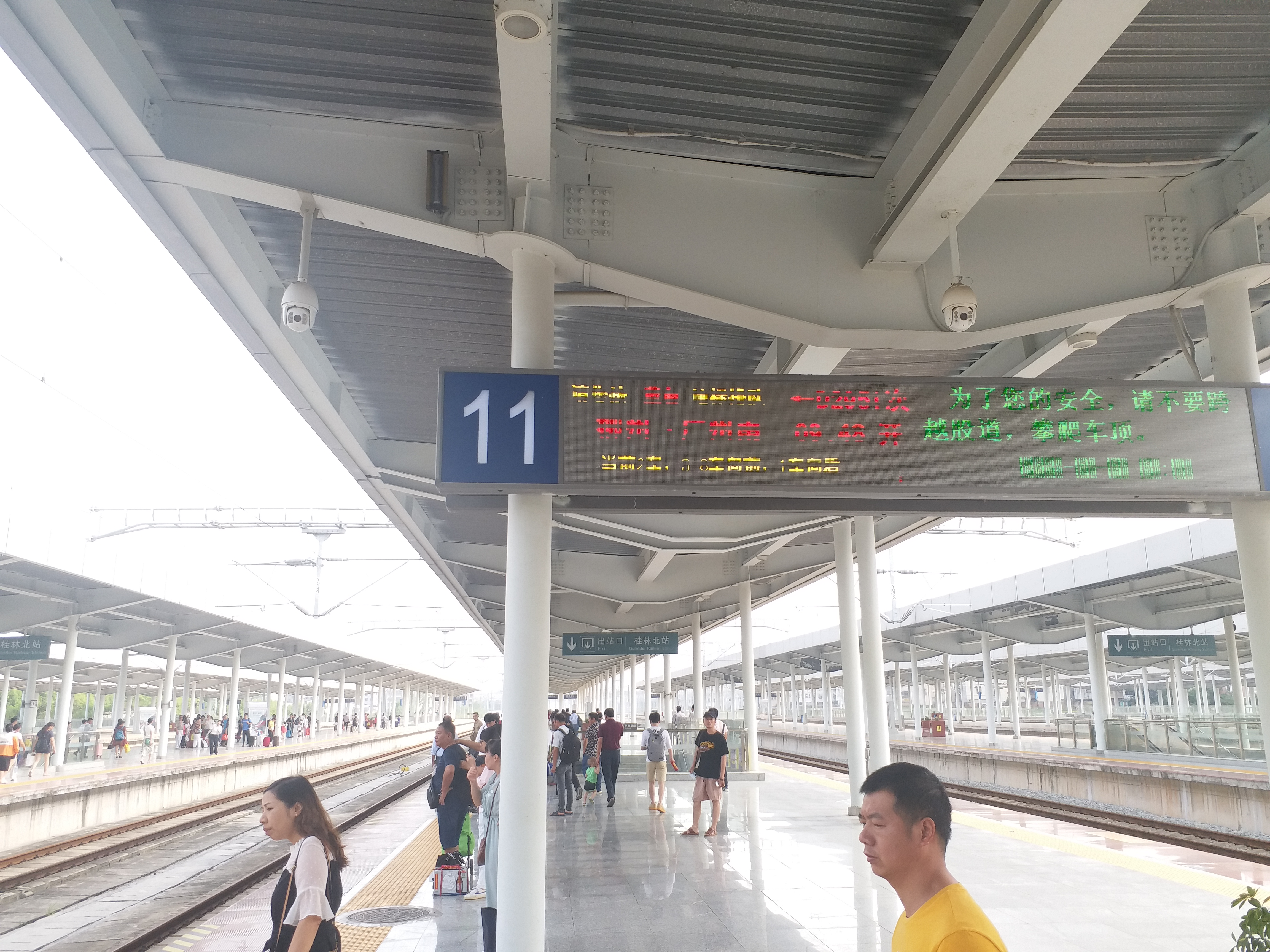 桂林北站照片